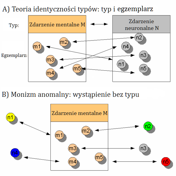 za ang